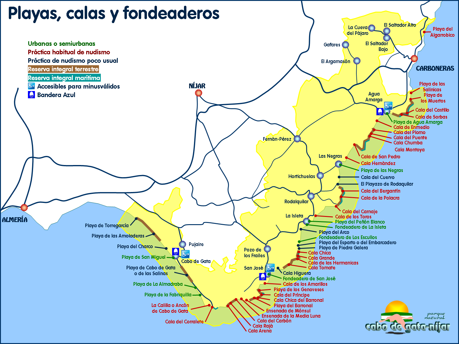 Playas del Parque Natural Cabo de Gata-Níjar